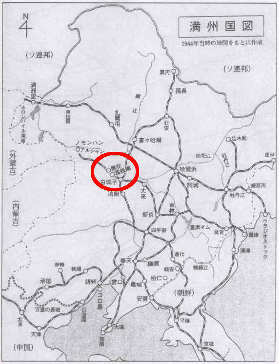 1944年の満州国の地図において葛根廟の位置を示す地図